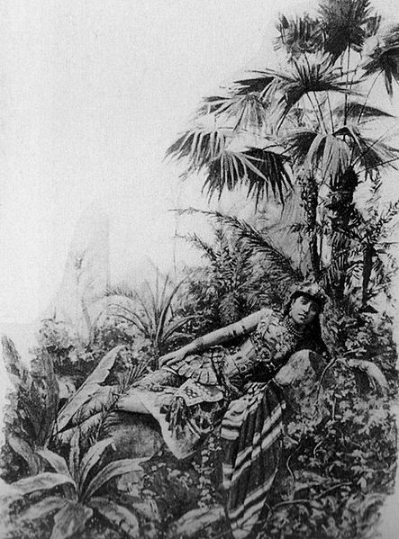 Maria Skorsyuk dans le rôle de Cléopatre du ballet Mlada